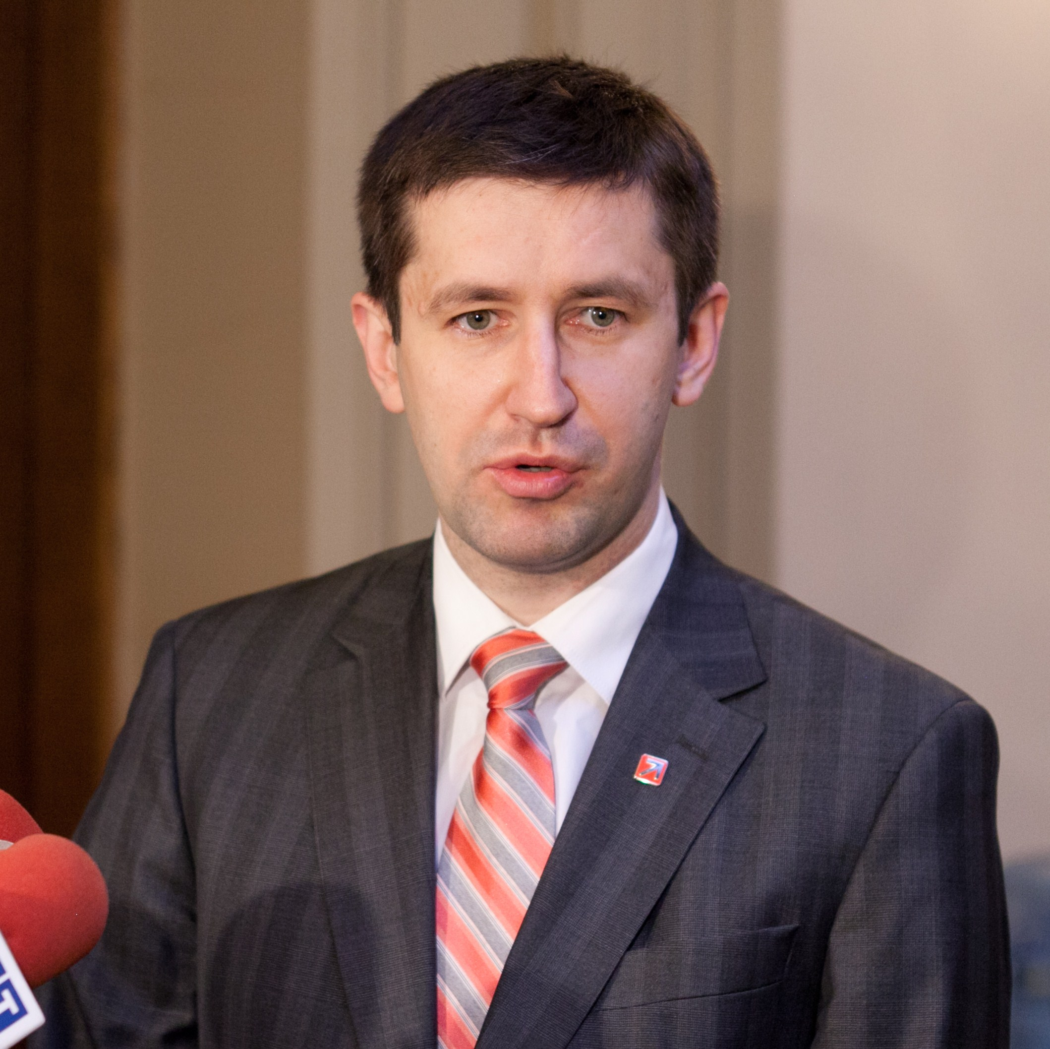 Vjačeslavs Dombrovskis